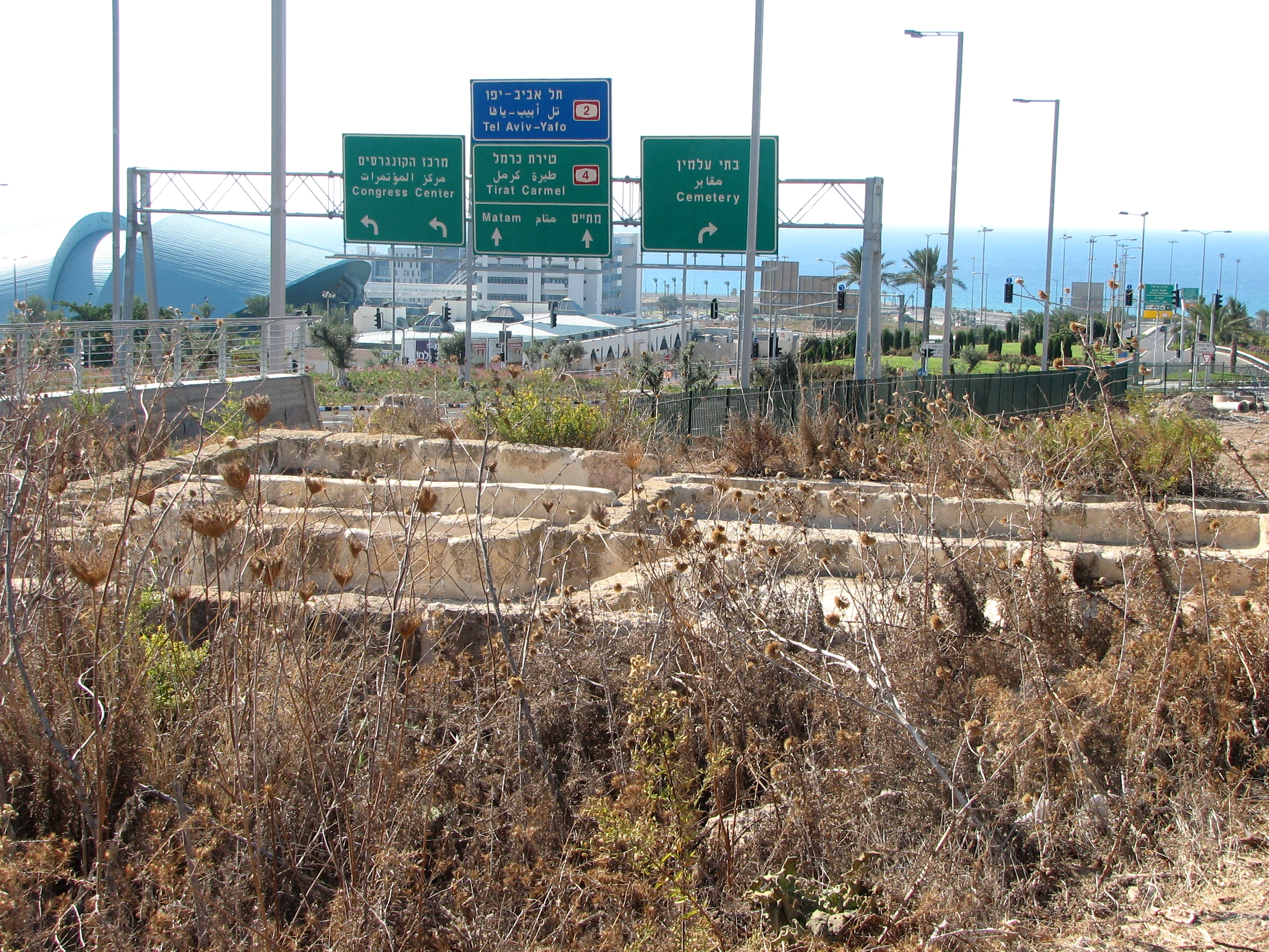 Hurbat Castra – Byzantine Period 4th-7th Centuries. Located at Haifa חורבת קסטרא, התקופה הביזנטית מאות 4-7 לספירה. החורבה נחפרה במבואותיה הדרומיים של חיפה, על התוואי המתוכנן של מנהרת הכרמל. באתר התגלתה עיר רומית ביזנטית שכלכלתה התבססה על ייצור יין ושמן זית בכמויות תעשייתיות שרידי מבנים שנשארו באתר שרידי העטר ליד כביש הגישה לכניסה למנהרות הכרמל